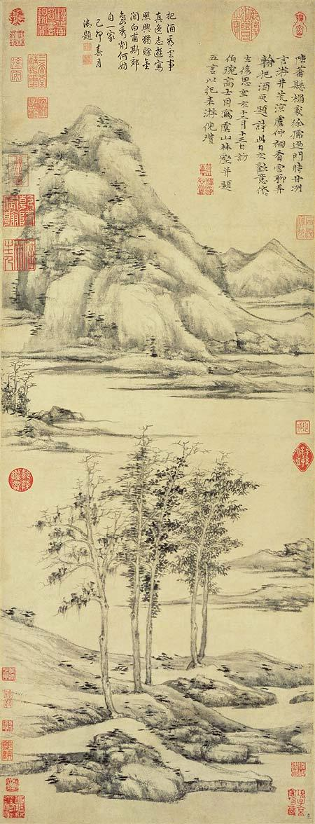 Ни Цзань. Деревья и долины горы Ю. 1372 Метрополитен